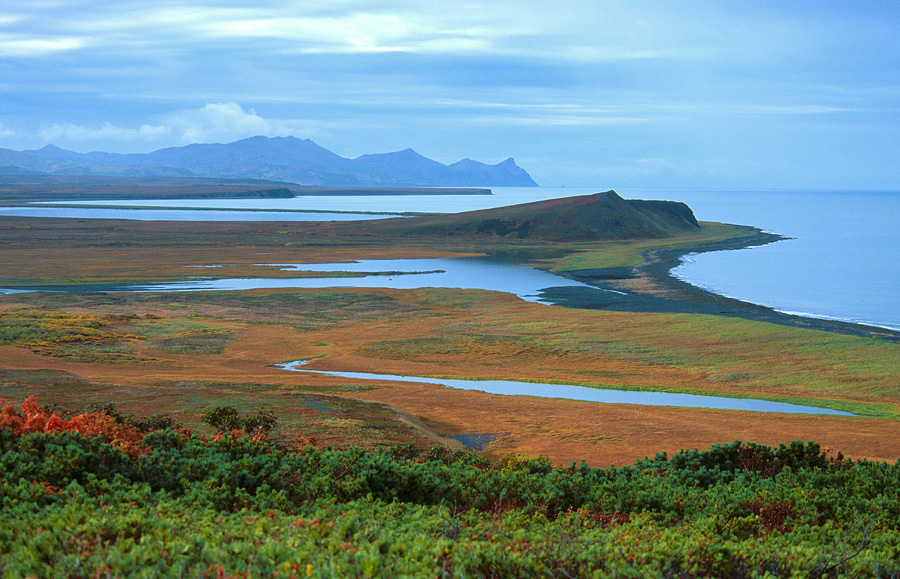 Участок Корякского заповедника на полуострове Говена. Корякия, Камчатский край.